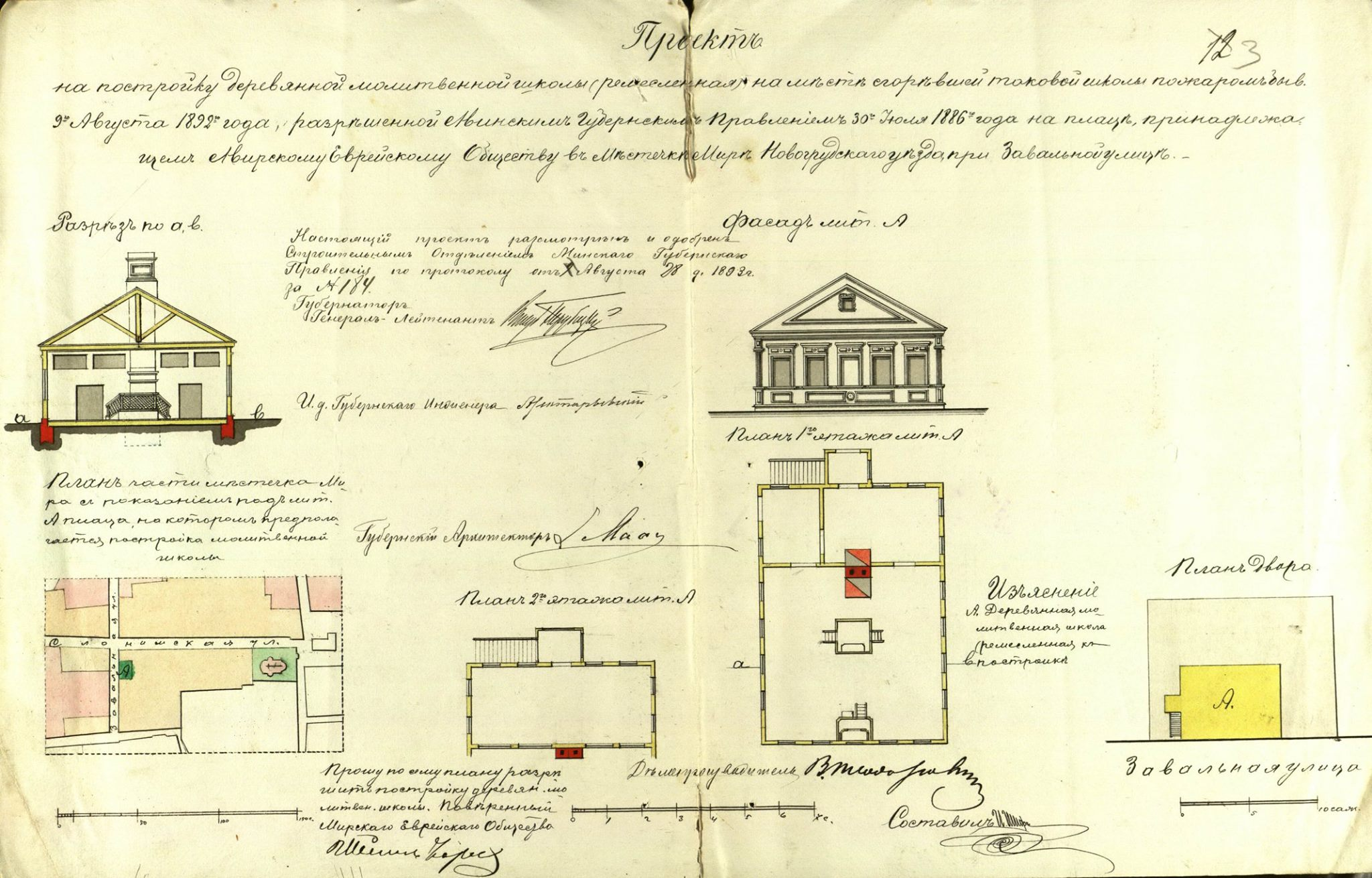 Беларуская (тарашкевіца): Мір (Mir), вуліца Завальная (vulica Zavalnaja). Юдэйская малітоўная школа